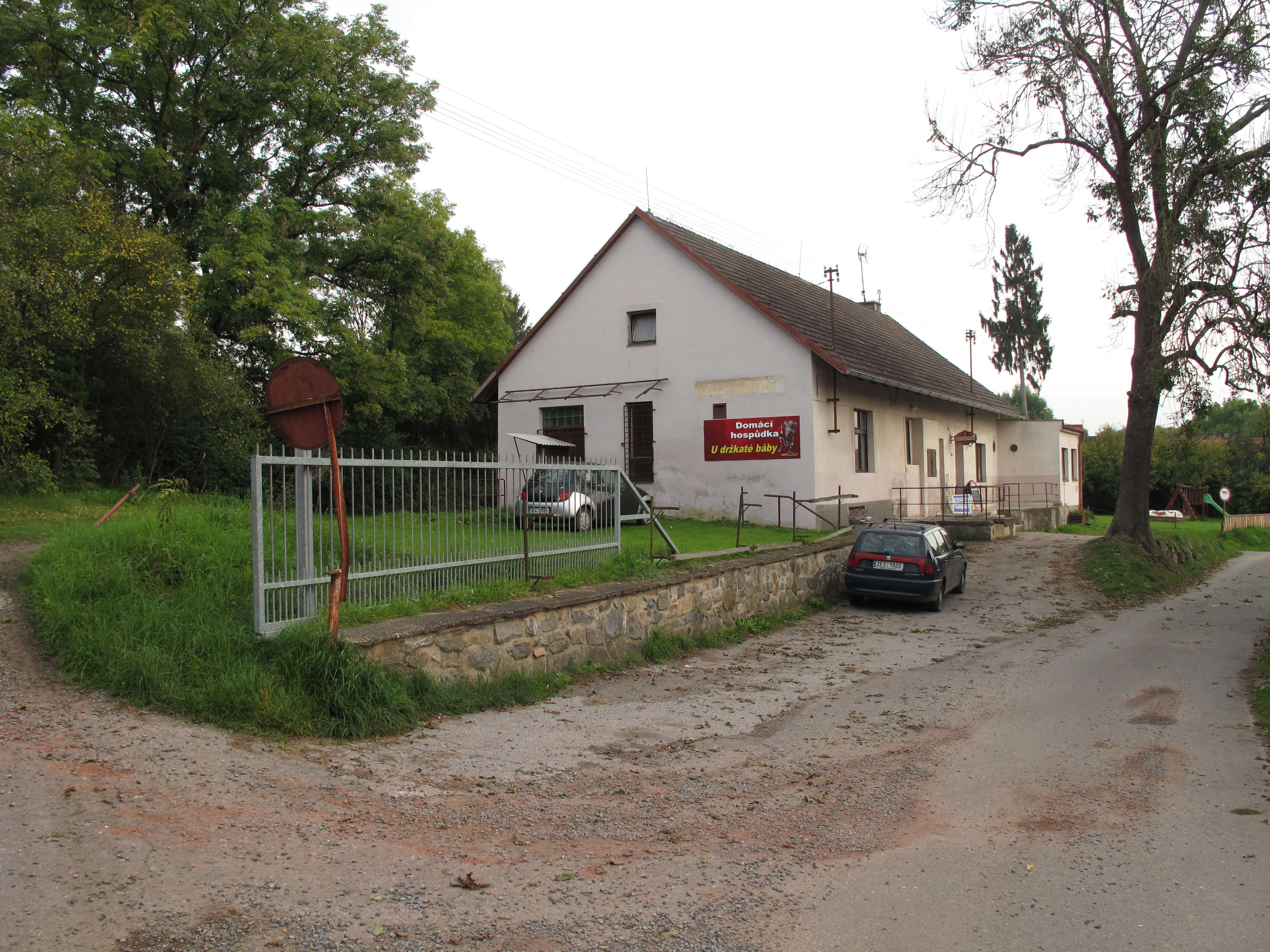 Hospoda v Pětihostech. Okres Praha-východ, Česká republika.